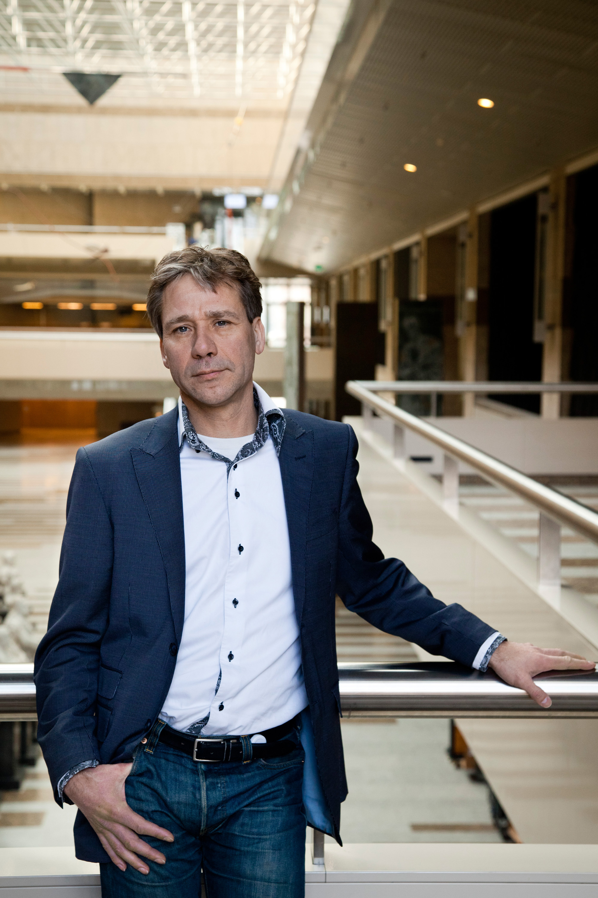 Hendrik Johannes (Rik) Grashoff (Krimpen aan den IJssel, 5 april 1961) is een Nederlands civiel ingenieur en Tweede Kamerlid voor GroenLinks vanaf 23 december 2010. Tussen september 2008 en Maart 2010 was hij wethouder participatie en cultuur van de gemeente Rotterdam.